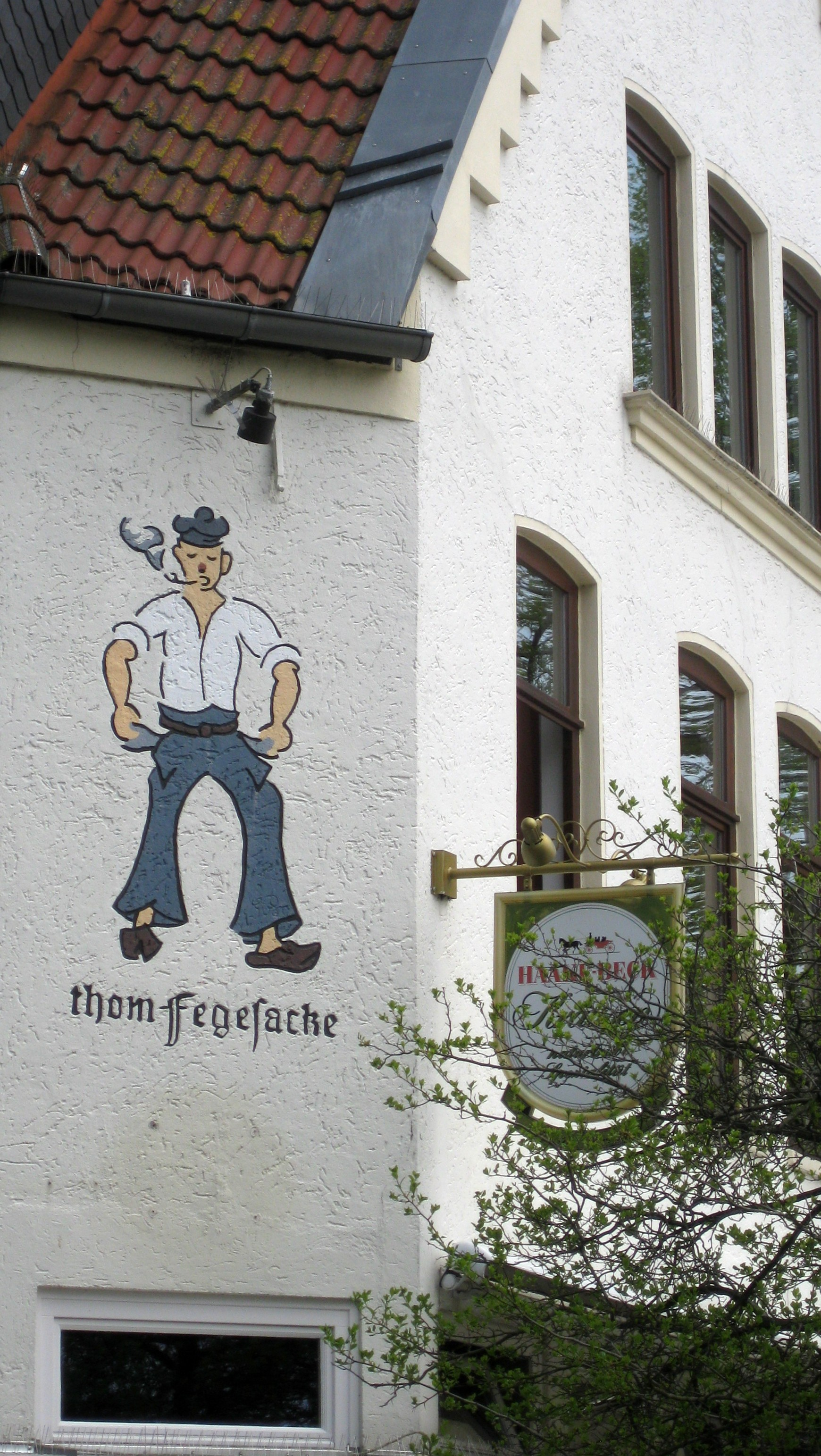 Vegesacker Jung mit gefegten (=geleerten) Taschen (=Sack) an der Hauswand der Gastwirtschaft "Zum Vegesacker Jungen"